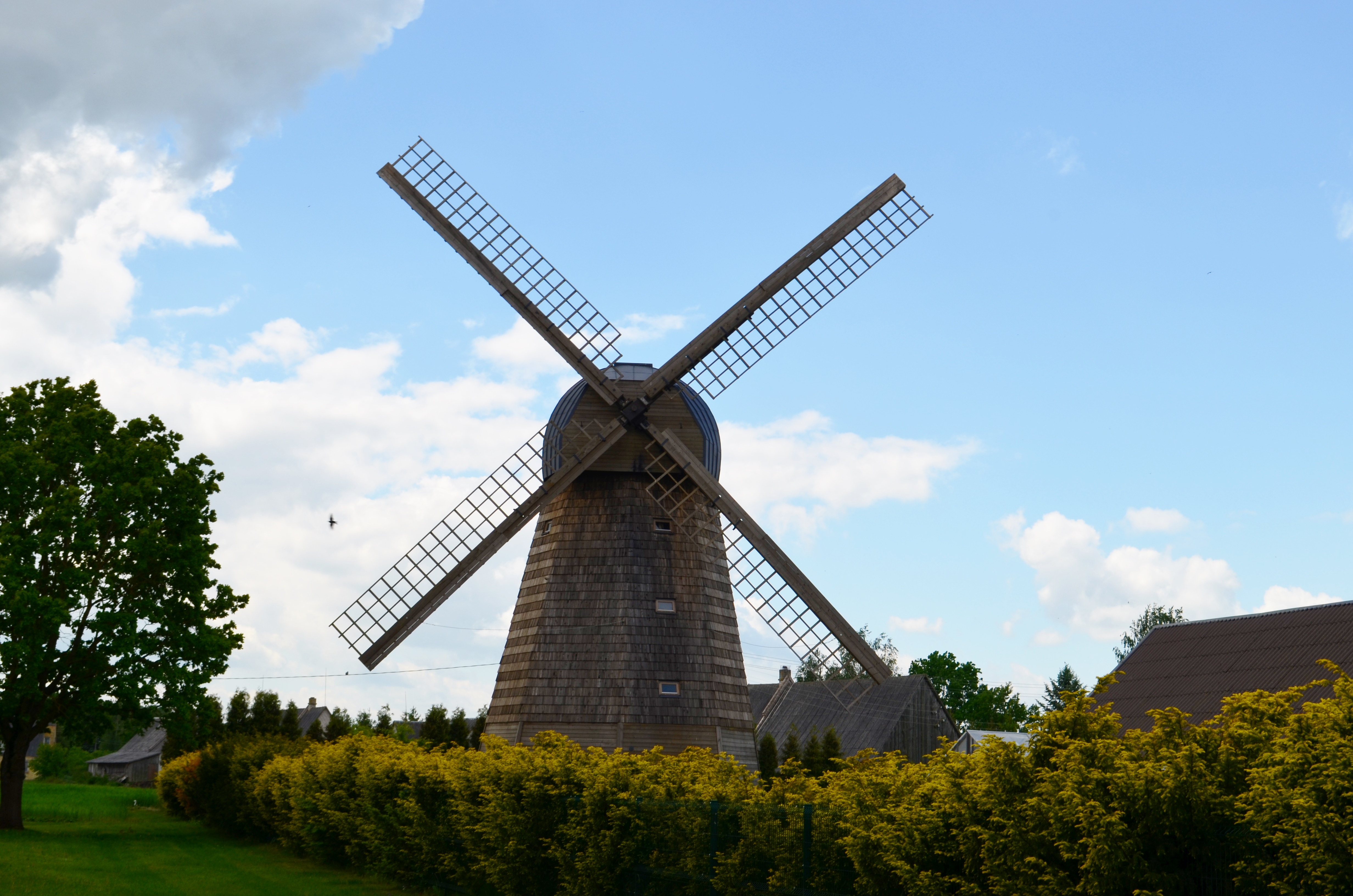 Mikėnų vėjo malūnas, Panevėžio raj.